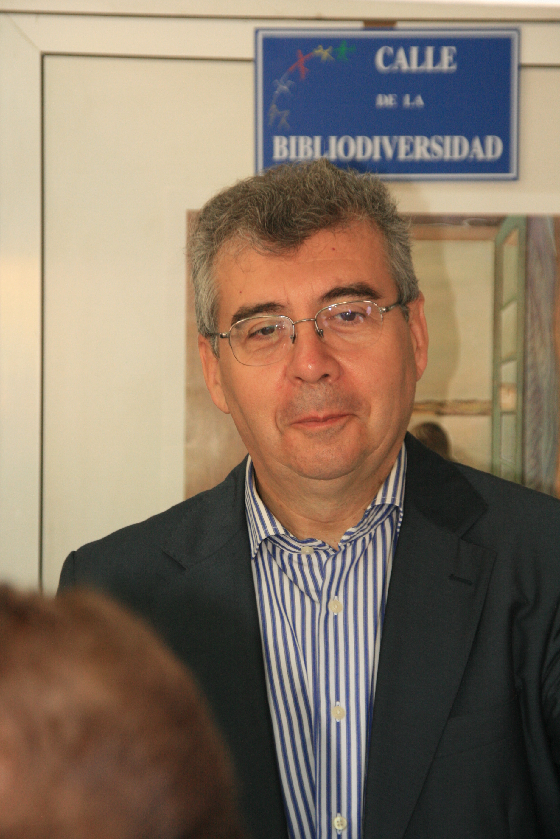 Pedro Montoliu firmando en la Feria del Libro de Madrid en el parque del Retiro